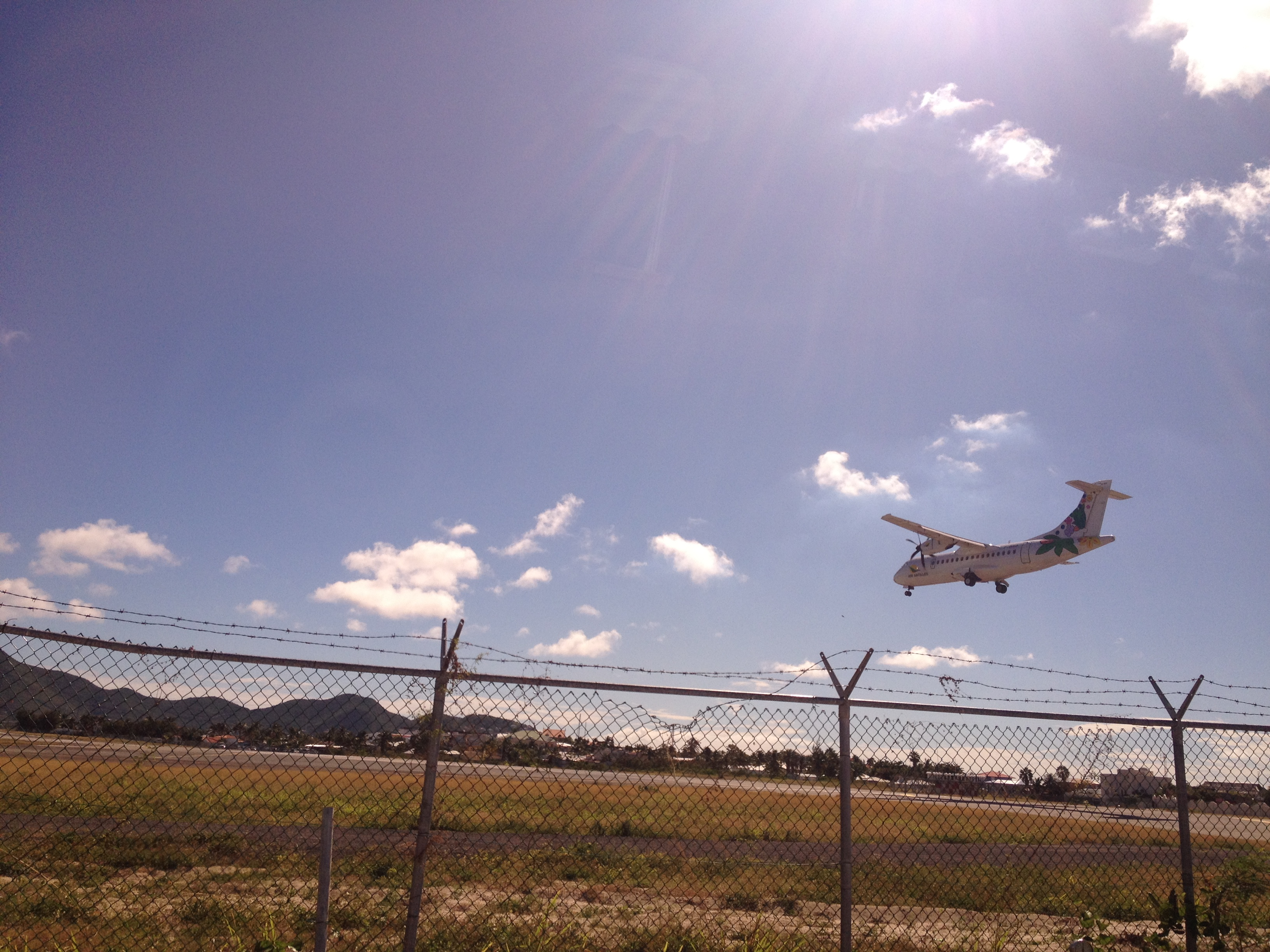 Puerta de Tierra, San Juan, Puerto Rico